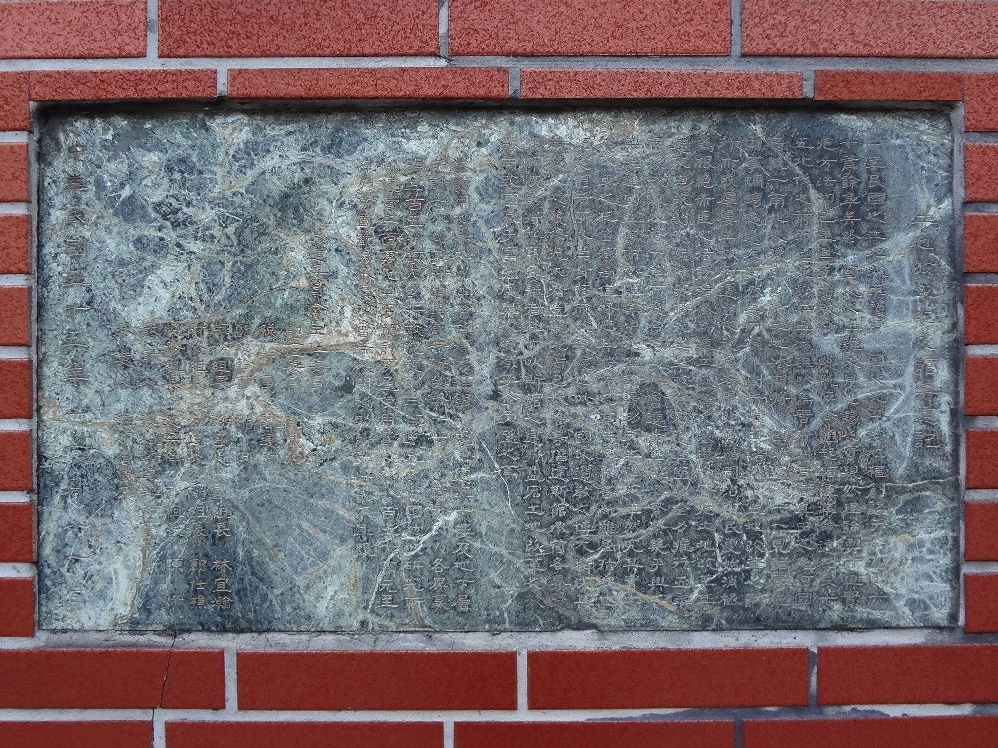 土地改革紀念館籌建記，位於敦化樓1樓外牆，1966年11月11日立。